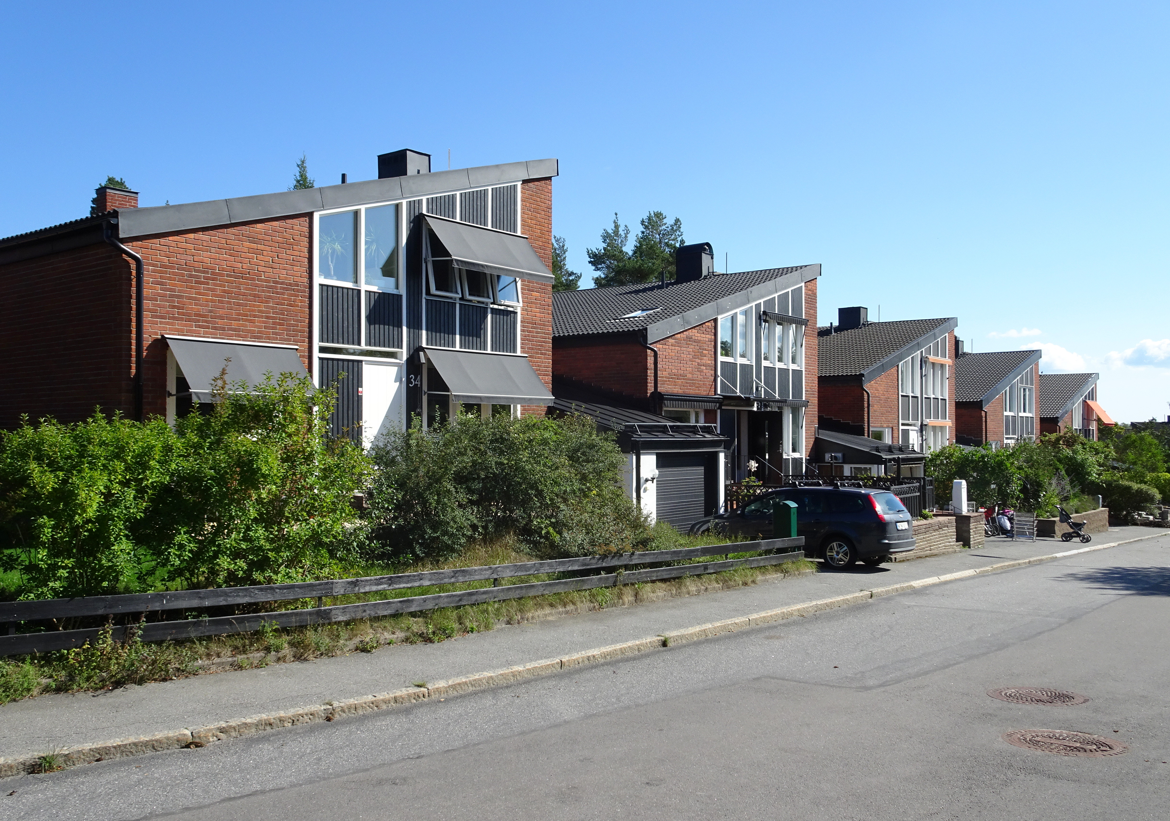 Kedjehusområdet Långsjöhöjden, arkitekter Gösta Nordin och Hans Alfont